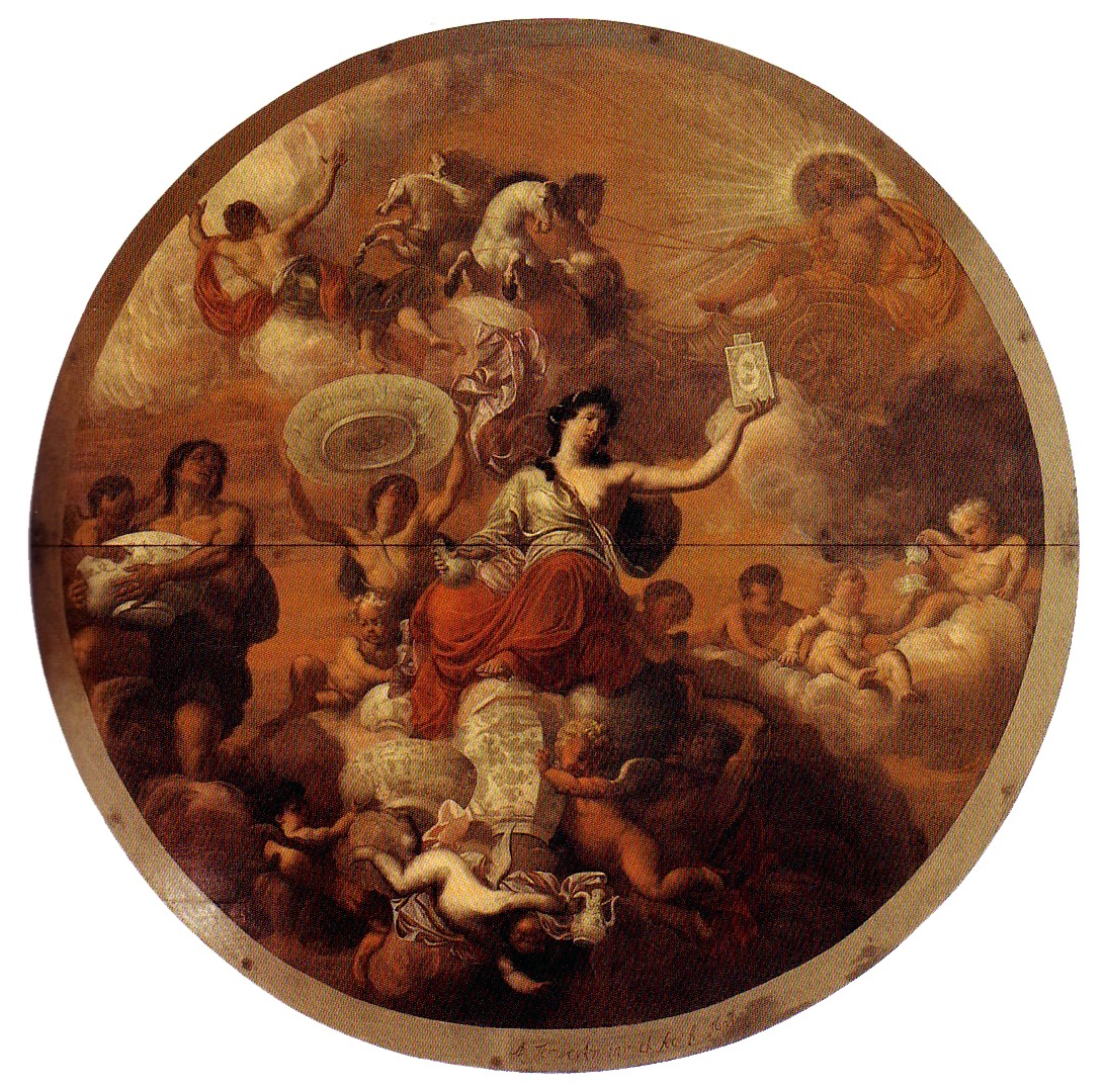 Deckengemälde